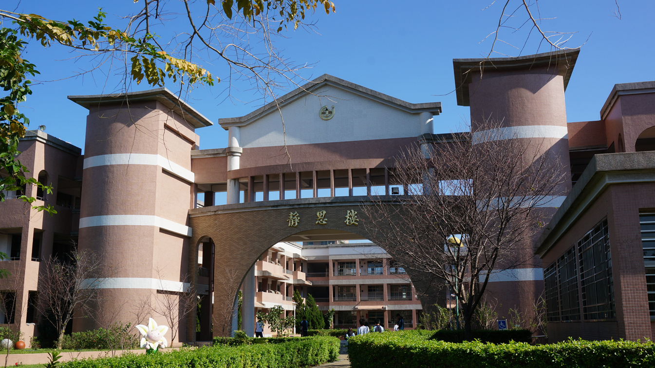 中文（台灣）: 新社高中靜思樓